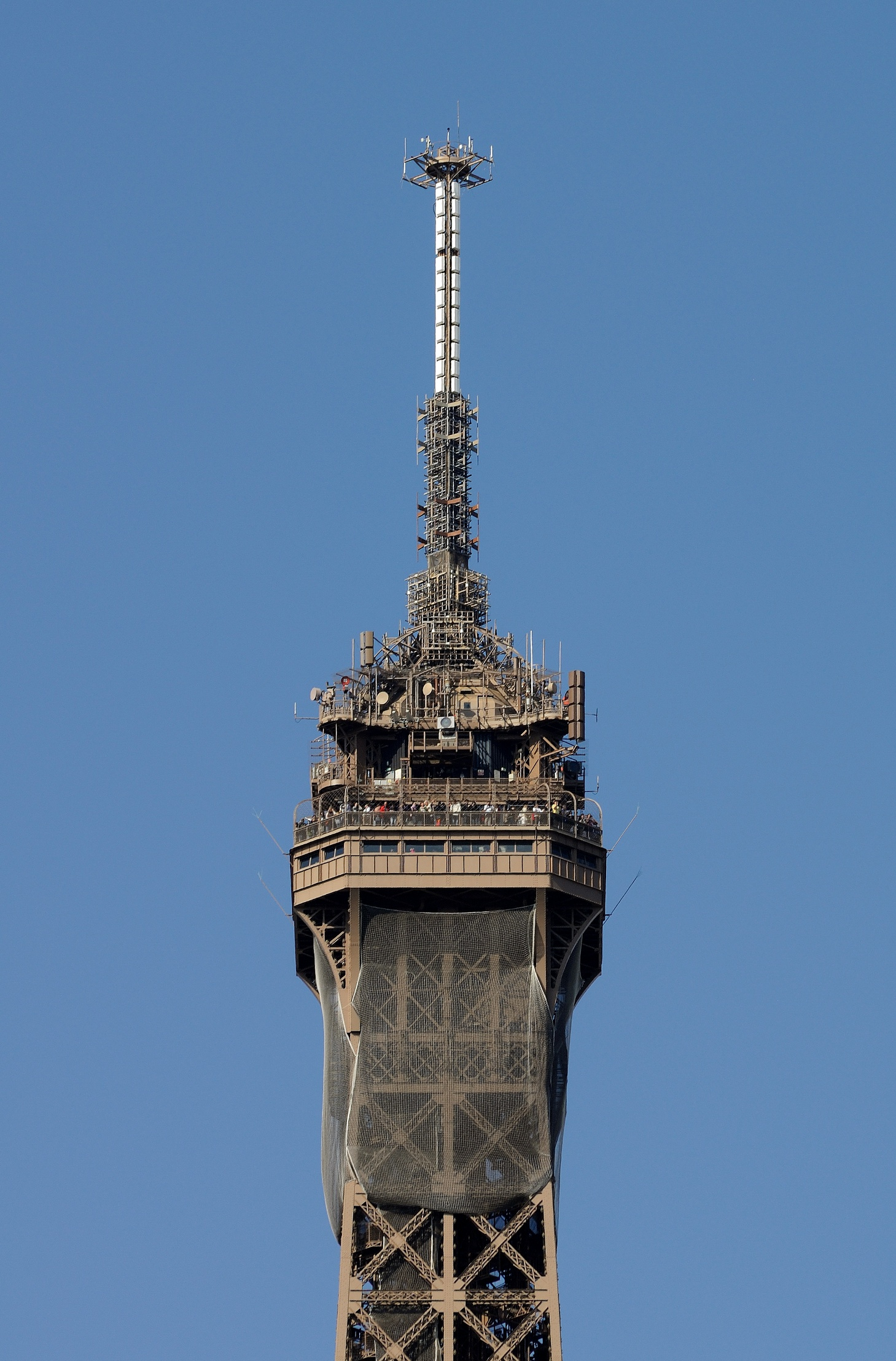 Paris: Spitze des Eiffelturms